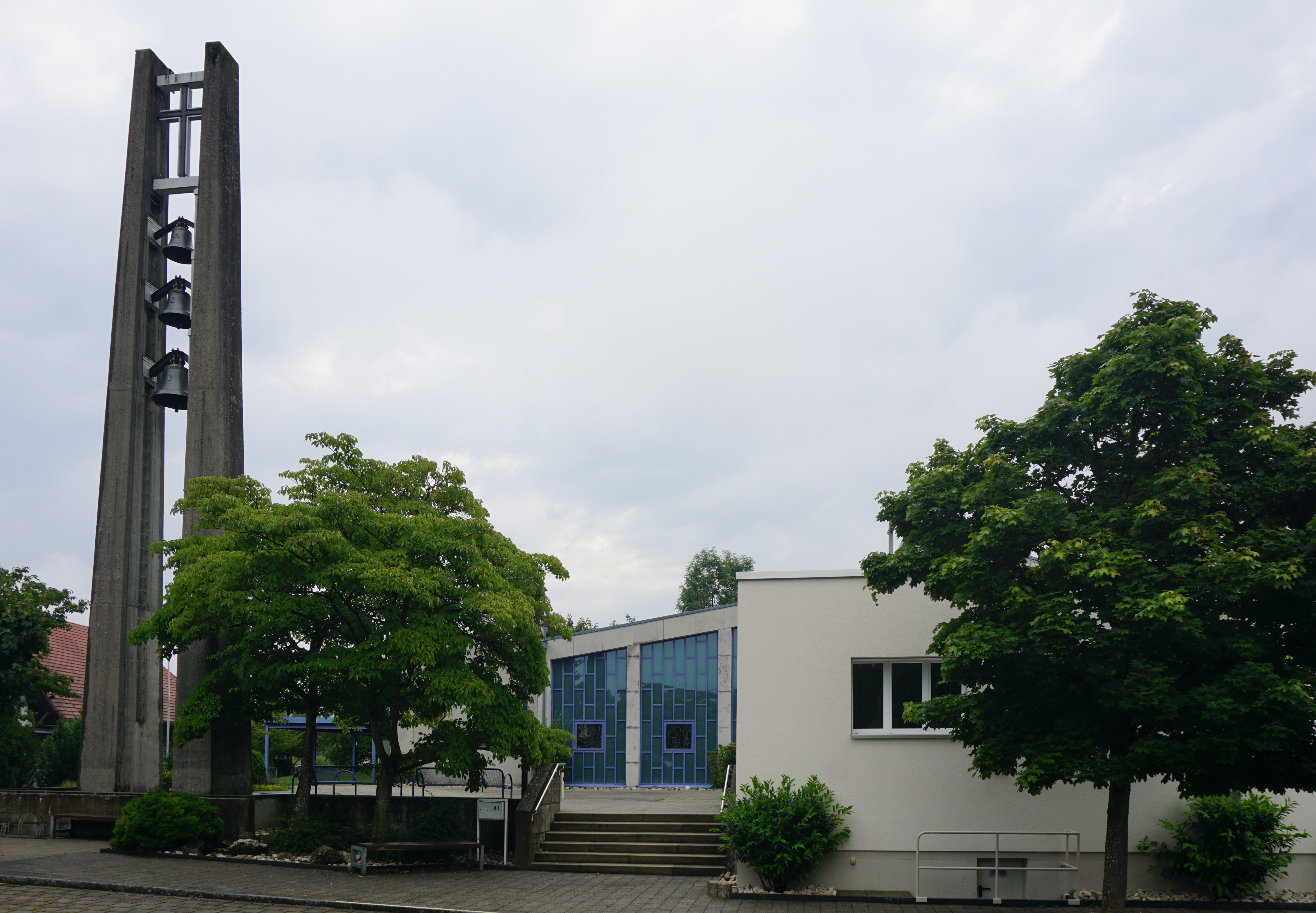 Kath. Kirche Utzenstorf mit Glockenträger